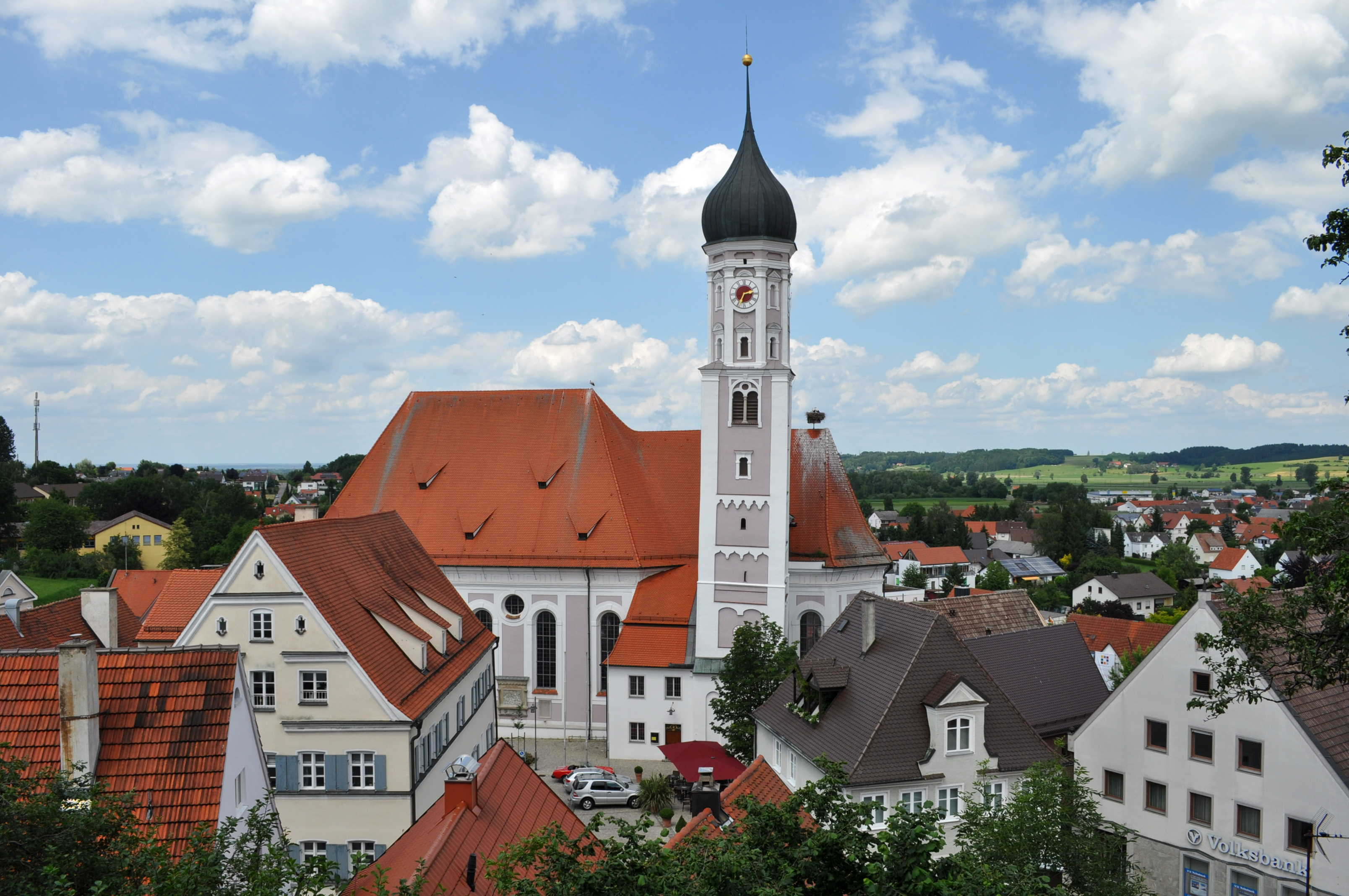 Burgau in Schwaben, Blick vom Schloss